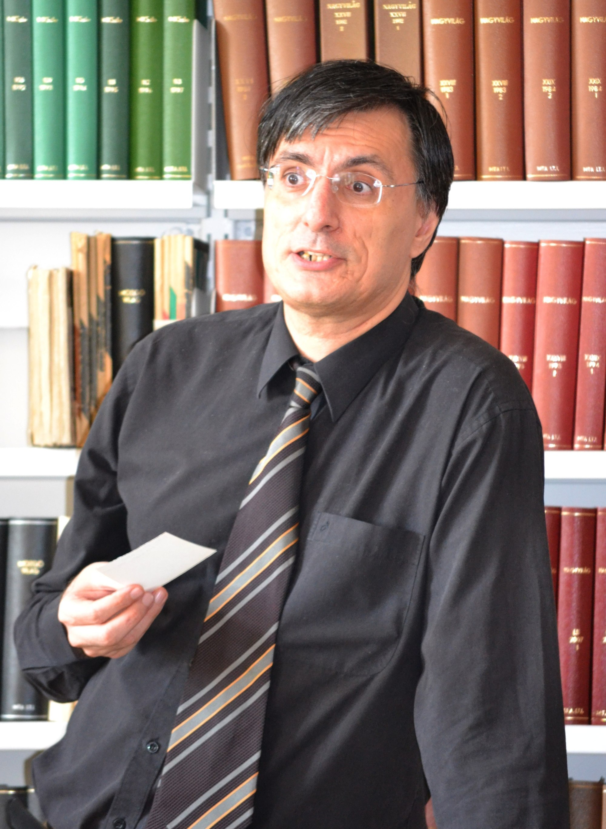 Kecskeméti Gábor (1965–) irodalomtörténész, Az MTA BTK Irodalomtudományi Intézetének 2013. évi könyvmustráján és plenáris ülésén